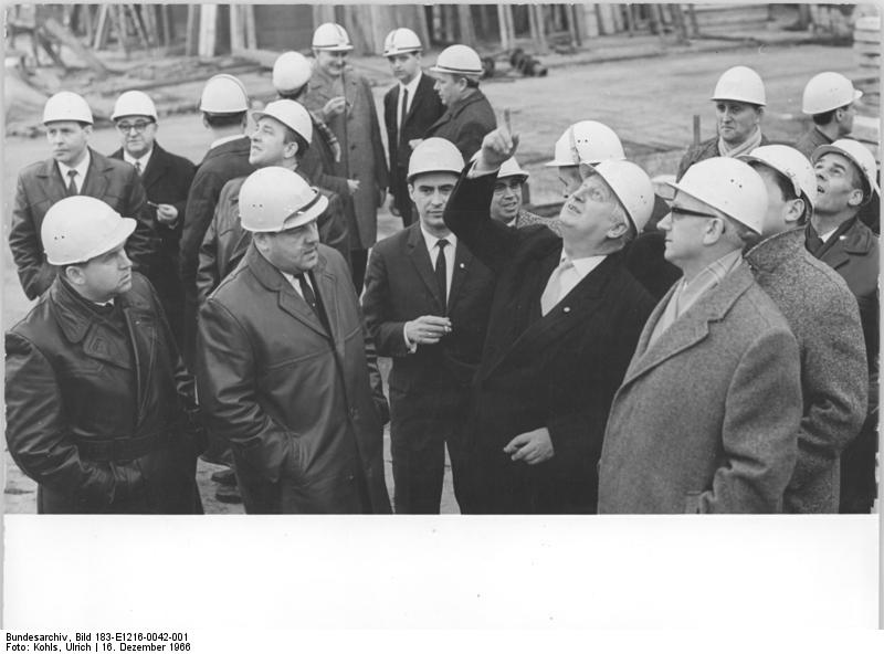 Zentralbild Kohls 16.12.1966 Auf der Baustelle des Berliner Fernsehturms erläutert bei einem Besuch des stellvertretenden Ministers für Post- und Fernmeldewesen, Gerhard Probst (rechts) am 16.12.1966 der Chefingenieur Professor Gerhard Frost (2.v.rechts) die Weiterführung der Arbeiten. Am gleichen Tage wurden auch die hervorragenden Leistungen der Baukollektive gewürdigt. Der Turm, der eine Höhe von 180,70 Meter erreicht hat, ist bereits jetzt das höchste Bauwerk der Spreemetropole.